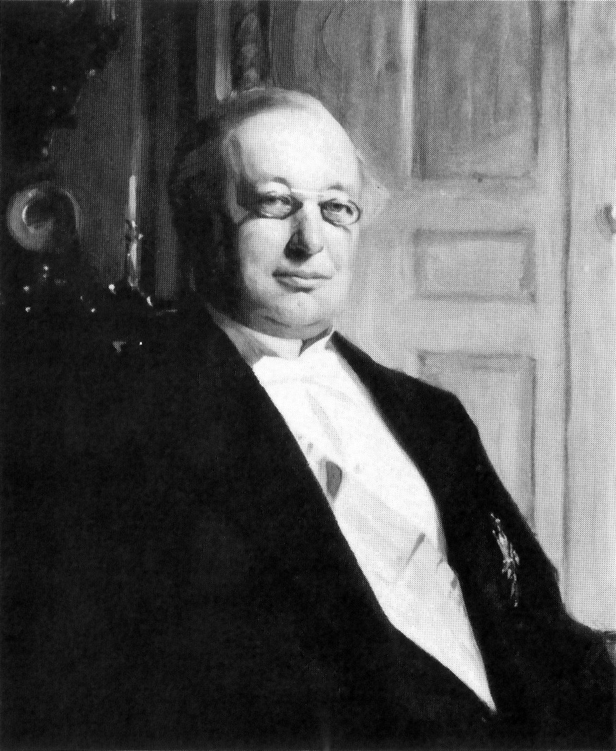 Erik Gustaf Boström portraited by Emil Österman.